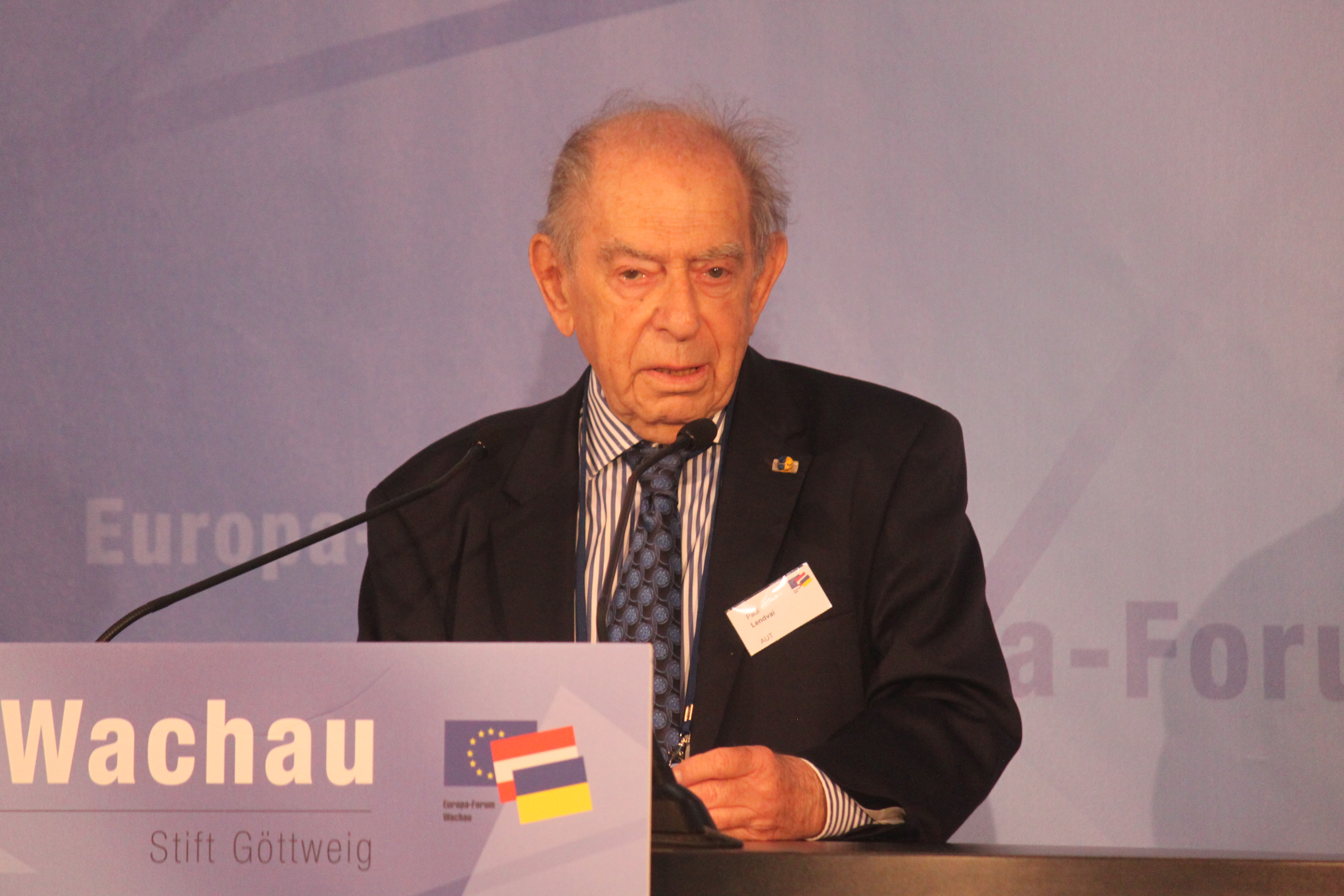 Paul Lendvai eröffnet das Europa-Forum Wachau, Plenarveranstaltung am 10. Juni 2017